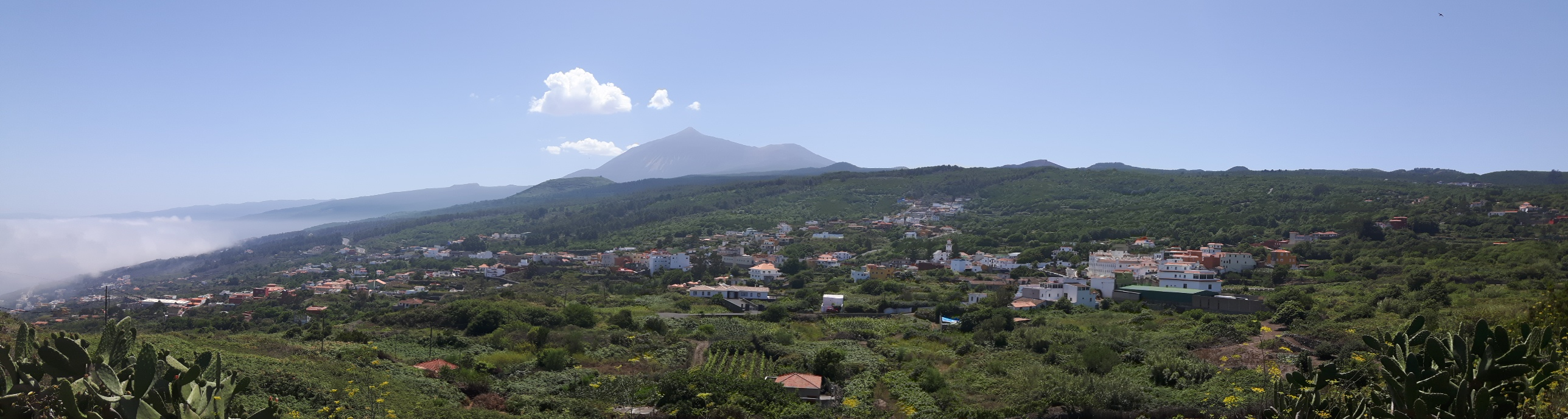 El Tanque vom Mirador Lomo Molino aus gesehen, im Hintergrund Teide und Pico Viejo